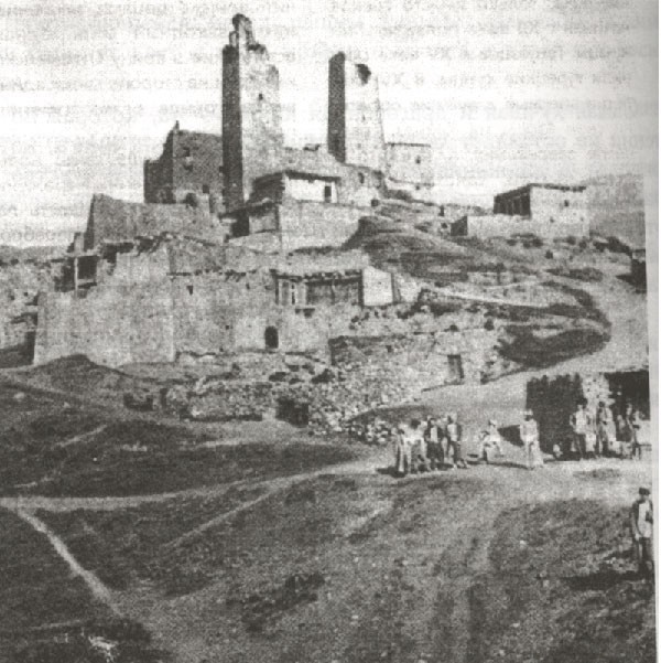 Село Шарой Чечня